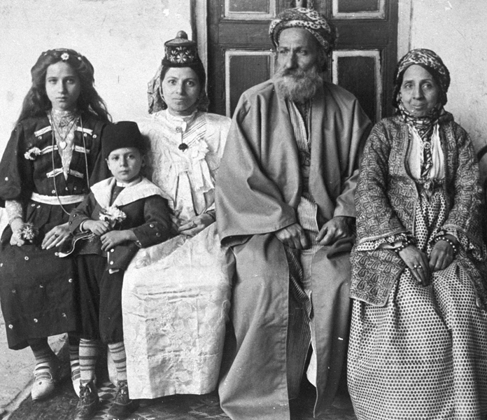 תמונה של משפחתו של הרב עזרא דנגור, שצולמה בשנת 1910